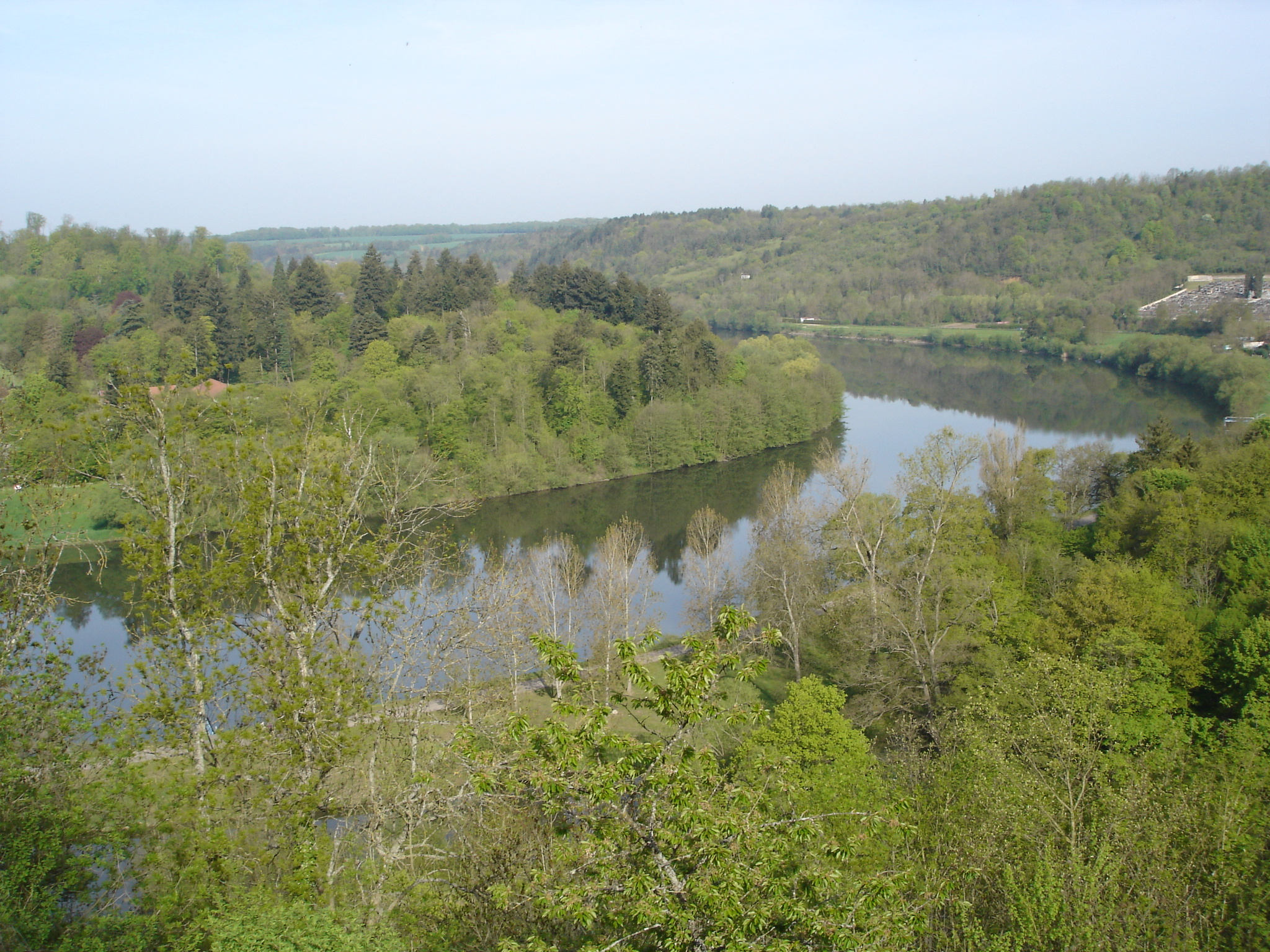 La Moselle vue depuis la ville haute à Liverdun (Meurthe-et-Moselle) -- Photo amateur prise par moi-même.